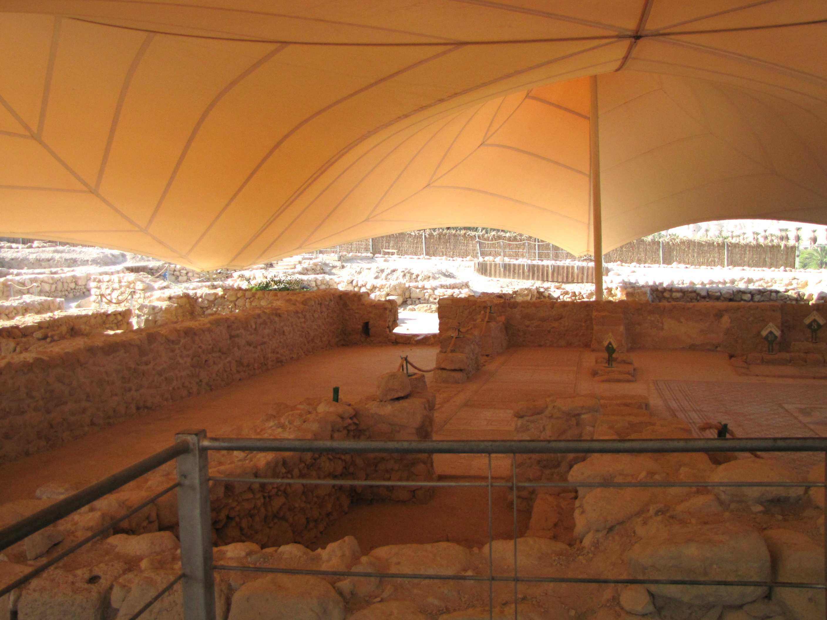 En Gedi, Synagoge.